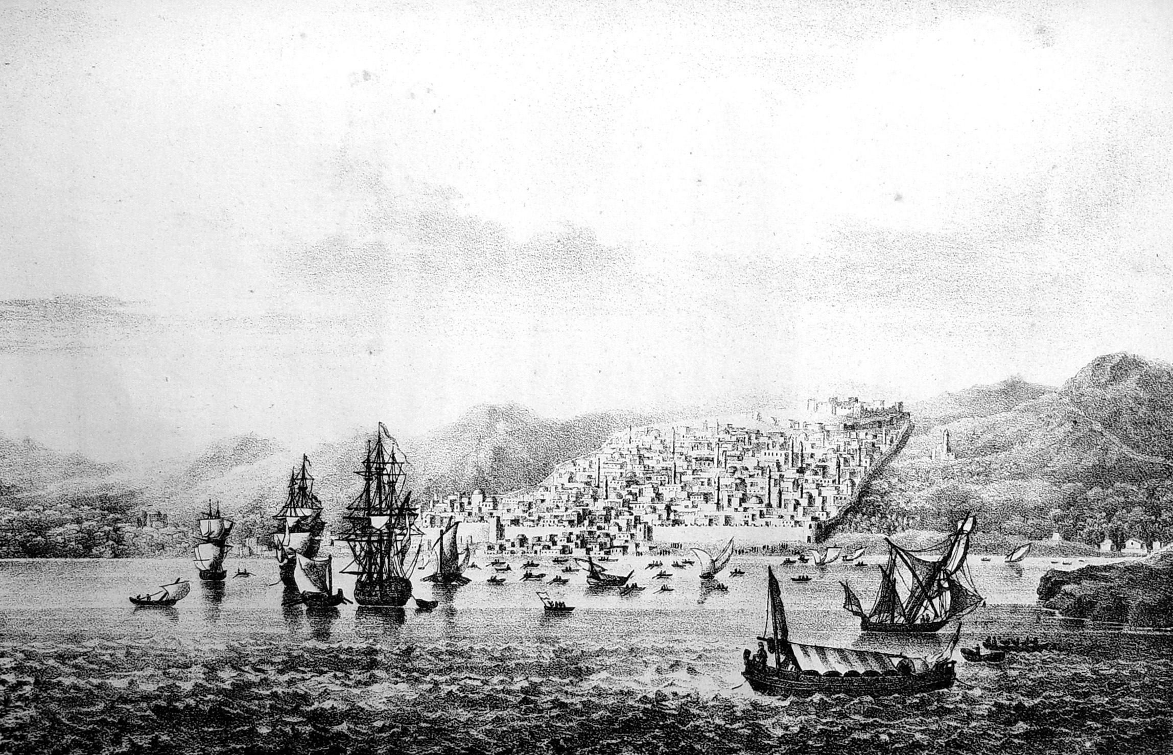 Vue générale de Thessalonique depuis le golfe thermaïque.